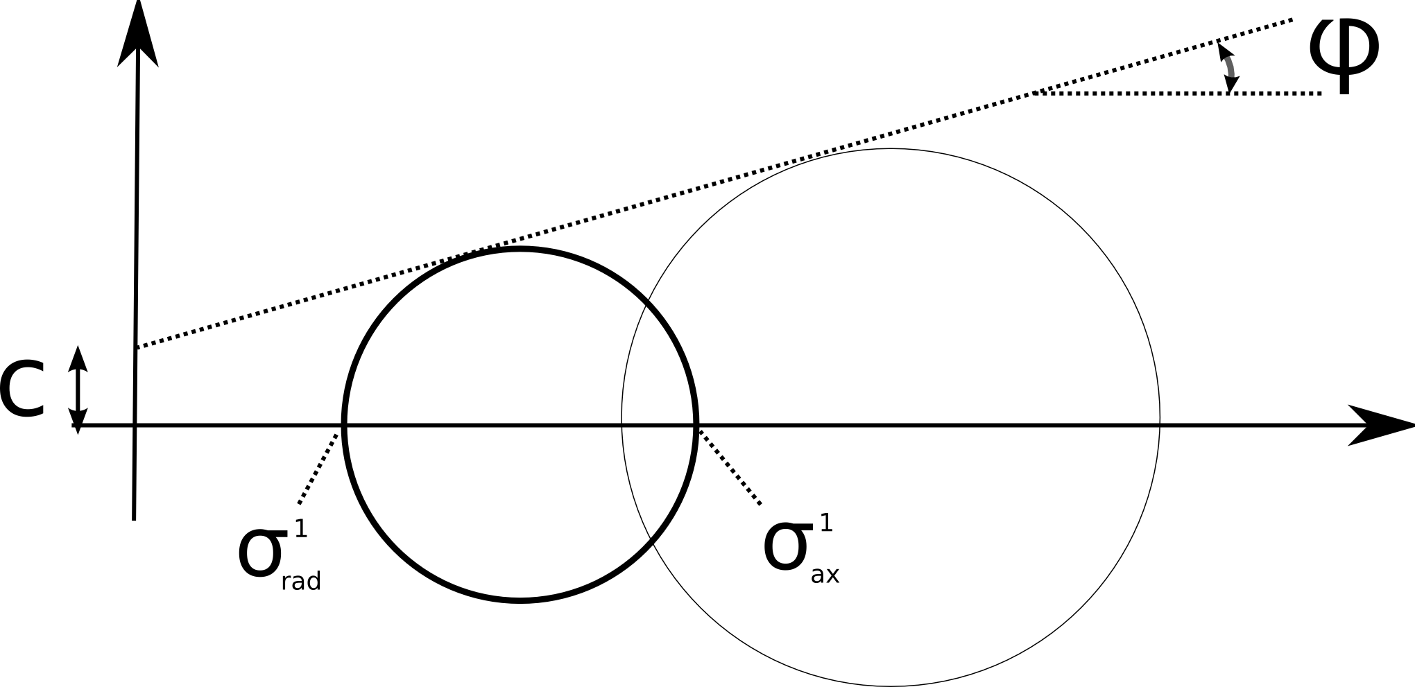 Zelf, inkscape